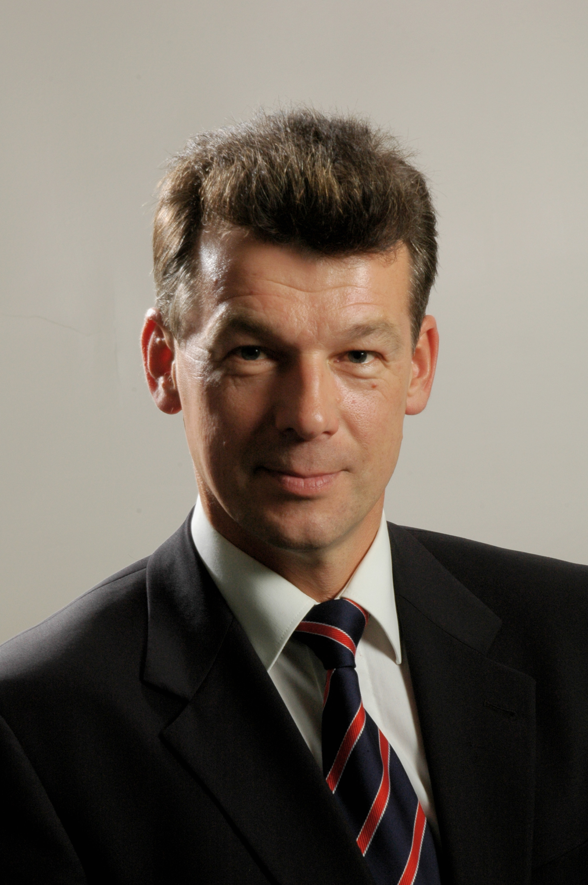 10.Saeimas deputāts Rihards Eigims